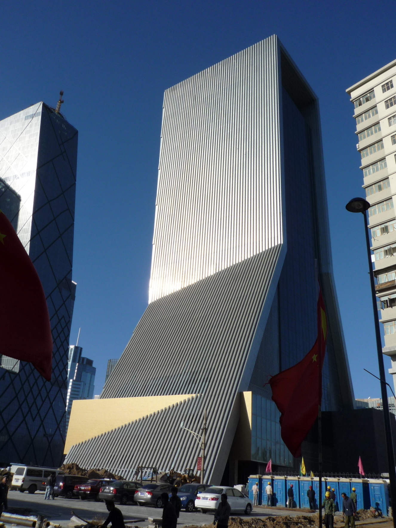 TVCC Site in 2007 中央電視台新大樓北配樓